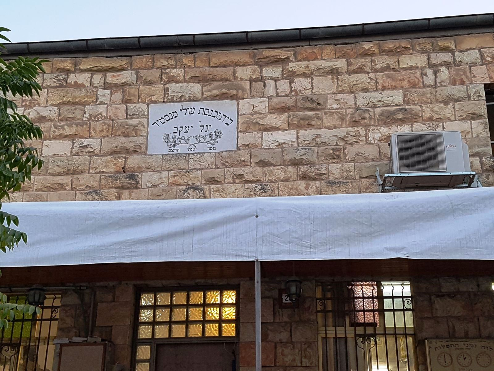 בית הכנסת יגל יעקב - מראה מבחוץ